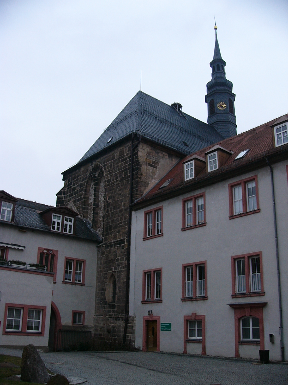 Kloster Himmelkron: Klosterkirche vom Innenhof aus gesehen